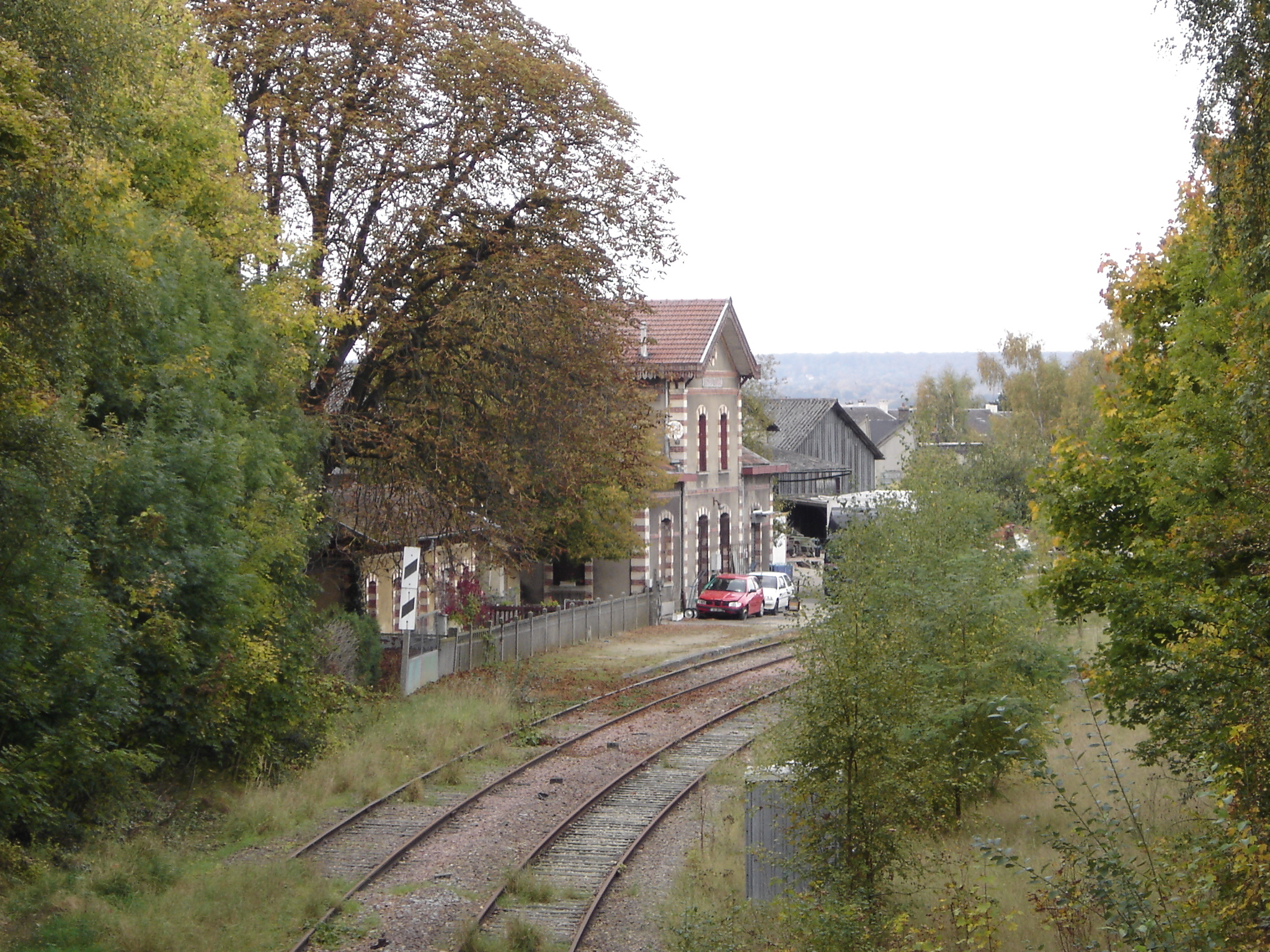 Vue, prise du pont routier de la D10, de la gare Saint-Cyr Grande Ceinture.